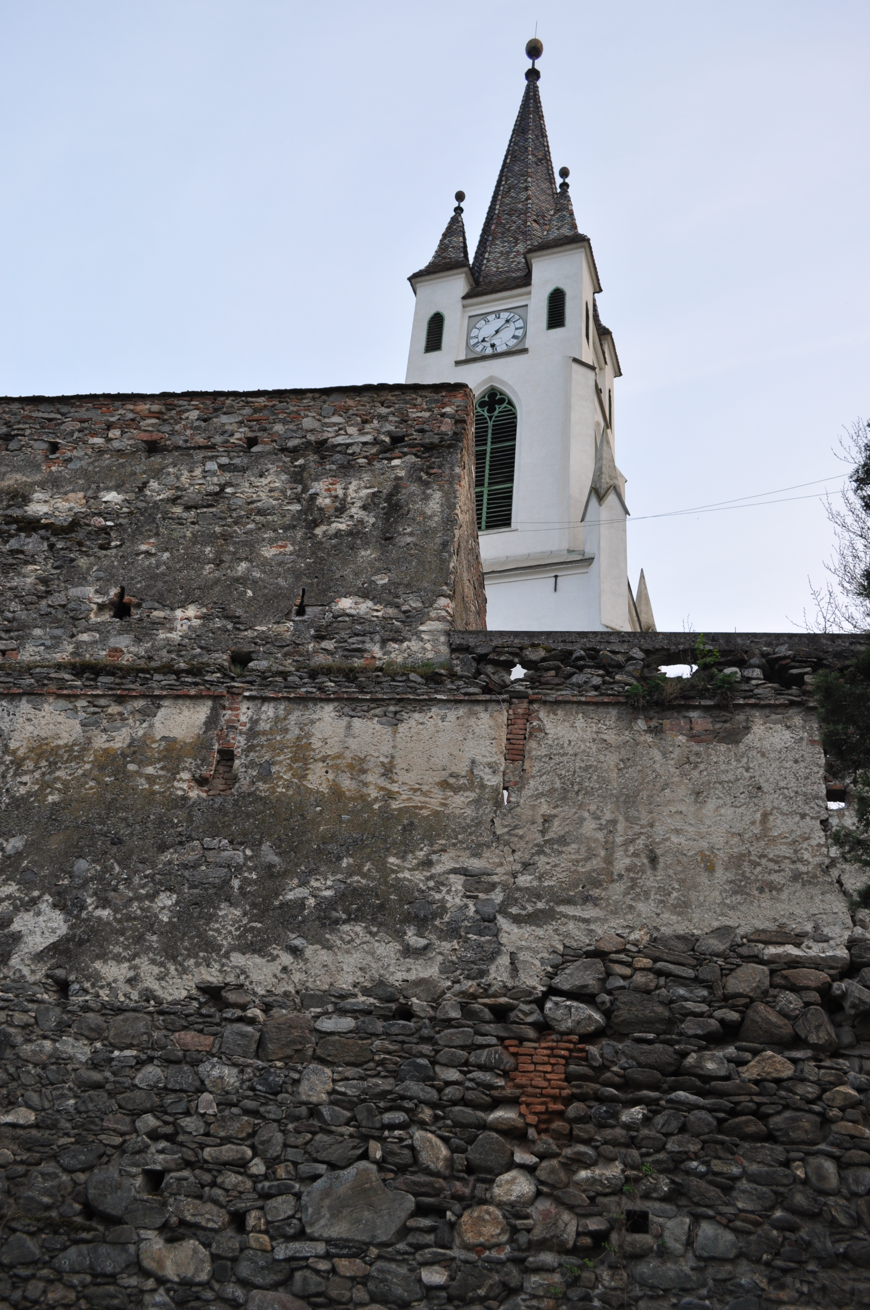 Cetatea medievală, Gârbova, județul Alba